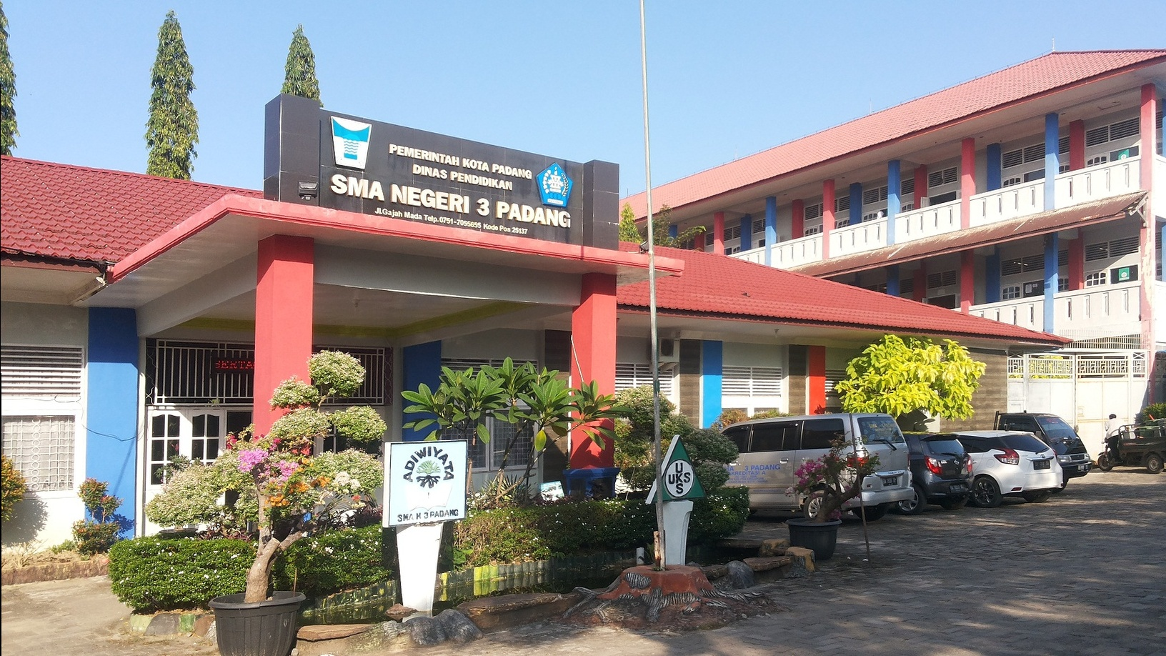 SMA Negeri 3 Padang